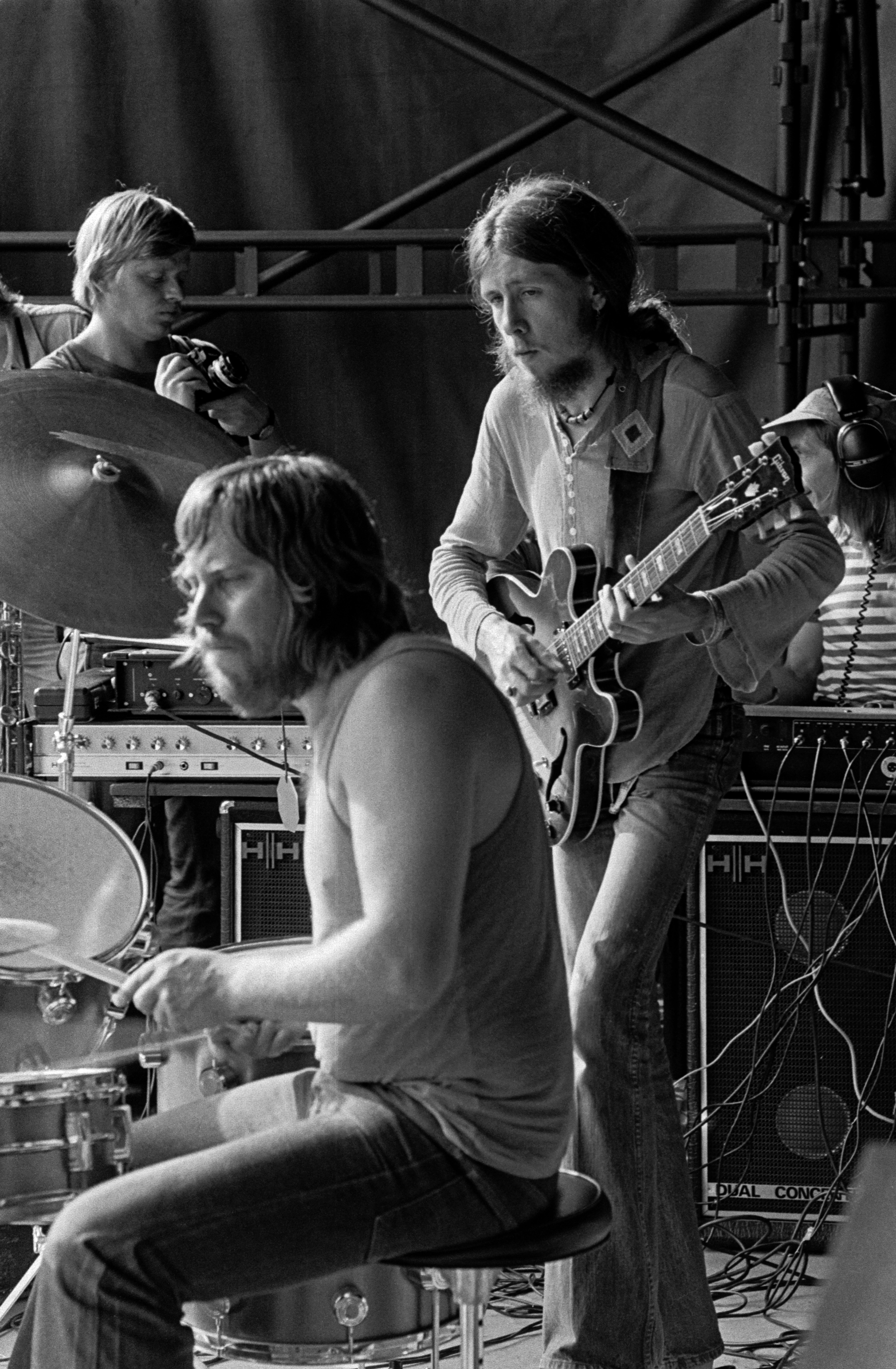 Jukka Tolonen yhtyeineen esiintyy ulkoilmakonsertissa. Esko Rosnell soittaa rumpuja. Jukka Tolonen soittaa kitaraa.